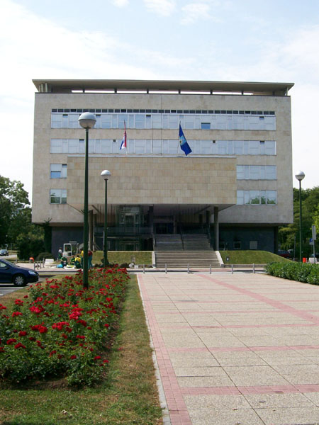 Zgrada Poglavarstva Grada Zagreba